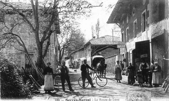 Serre-Nerpol : Route de Lyon en 1896. Carte postale ancienne.